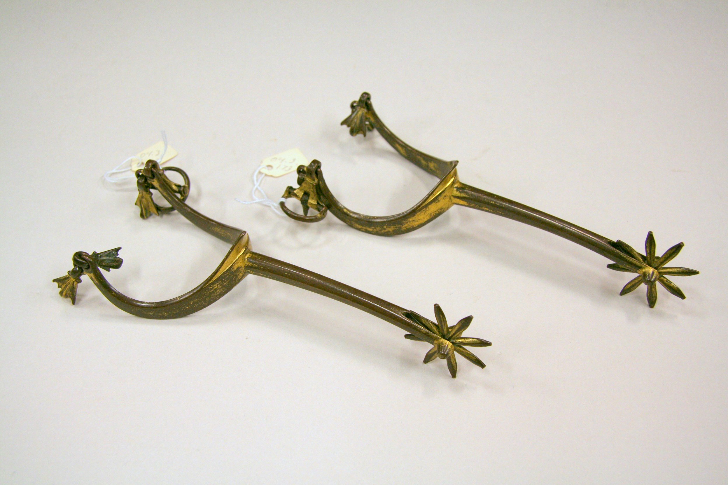 French; Spurs; Equestrian Equipment-Spurs